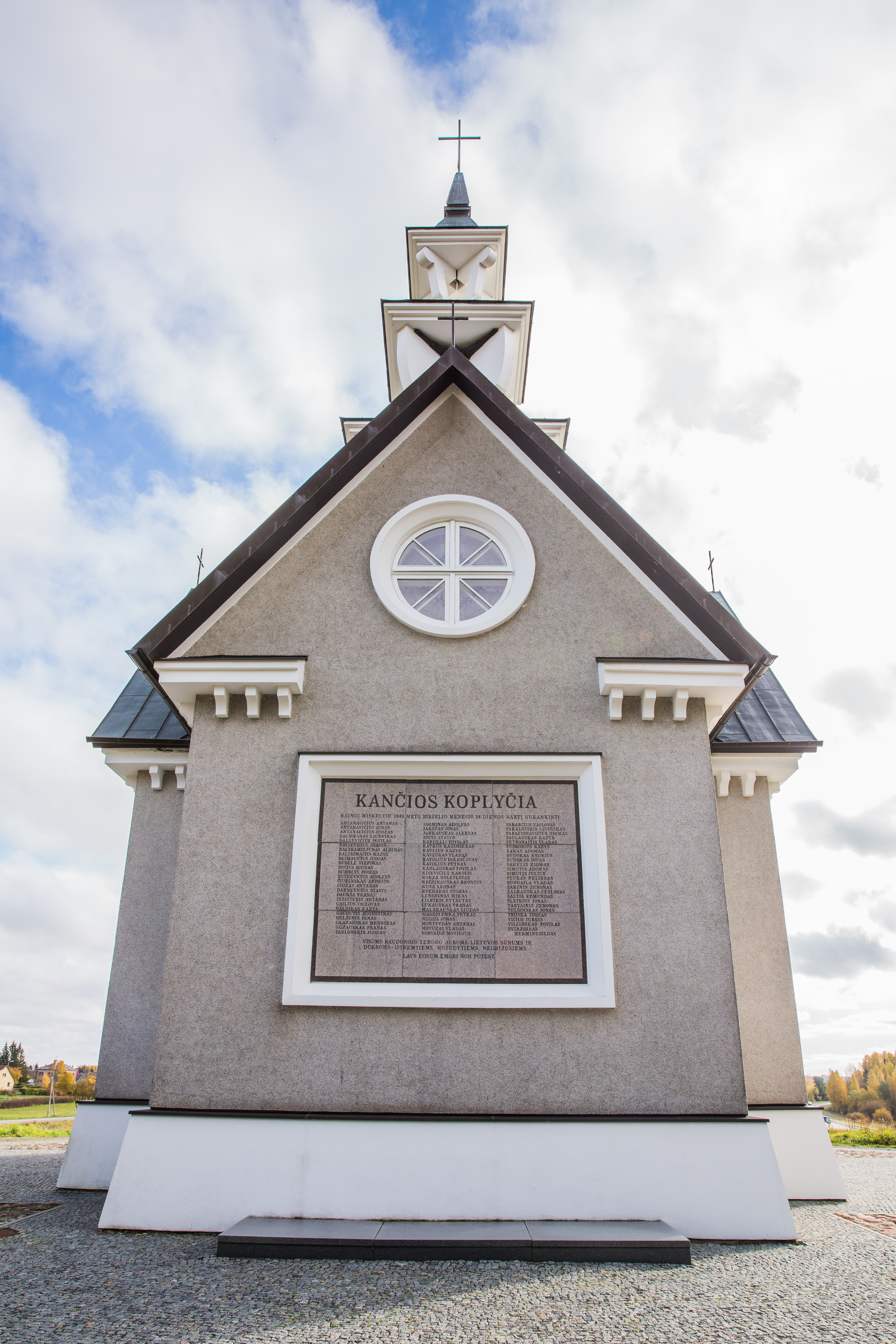 Rainių koplyčia